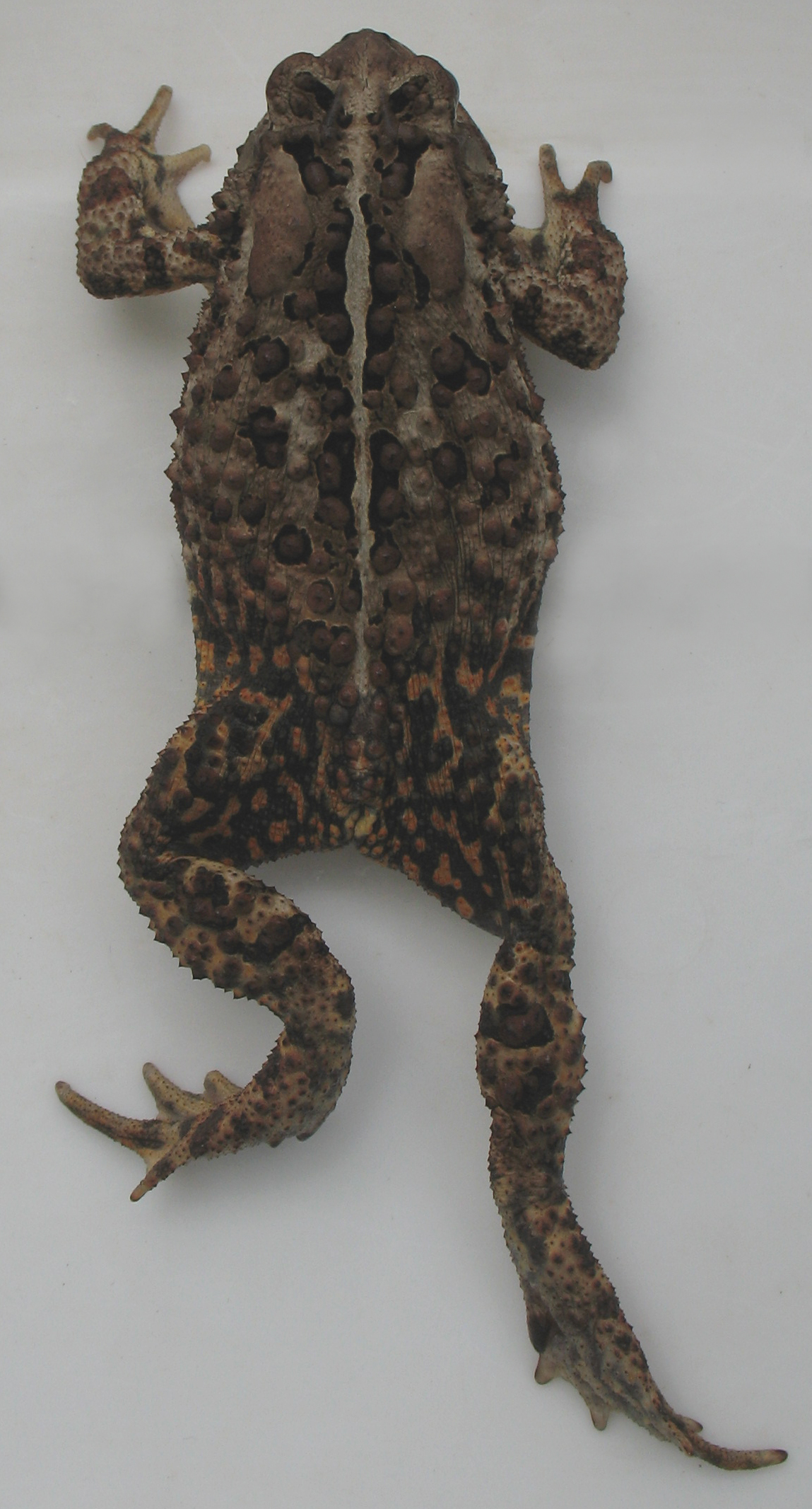 Crapaud, Lac-Beauport, Québec, Canada. (Crapaud boréal, Bufo boreas ?)